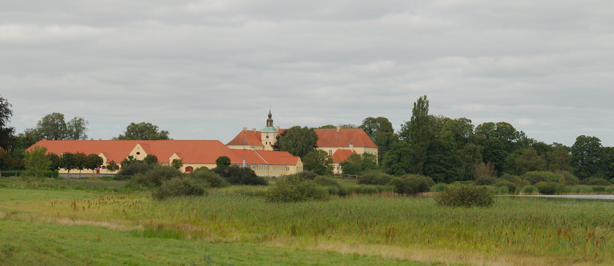 SoebySoegaard i 2012